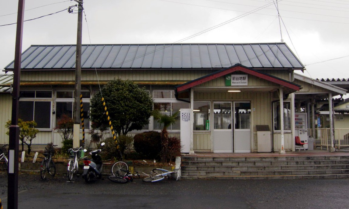 JR石巻線前谷地駅（JR Ishinomaki line,Maeyachi station）